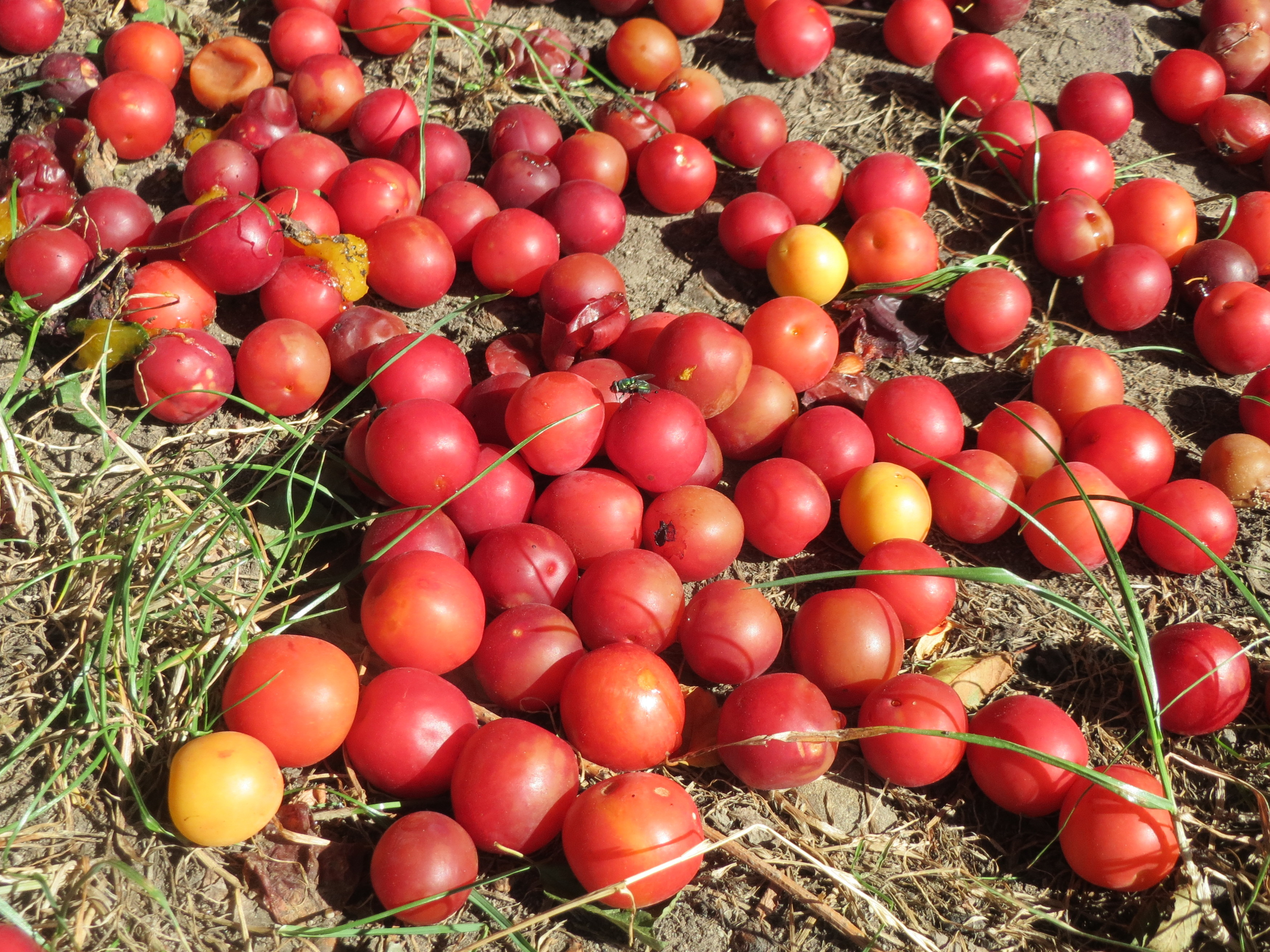 Kirschpflaumen (Prunus cerasifera) in Hockenheim